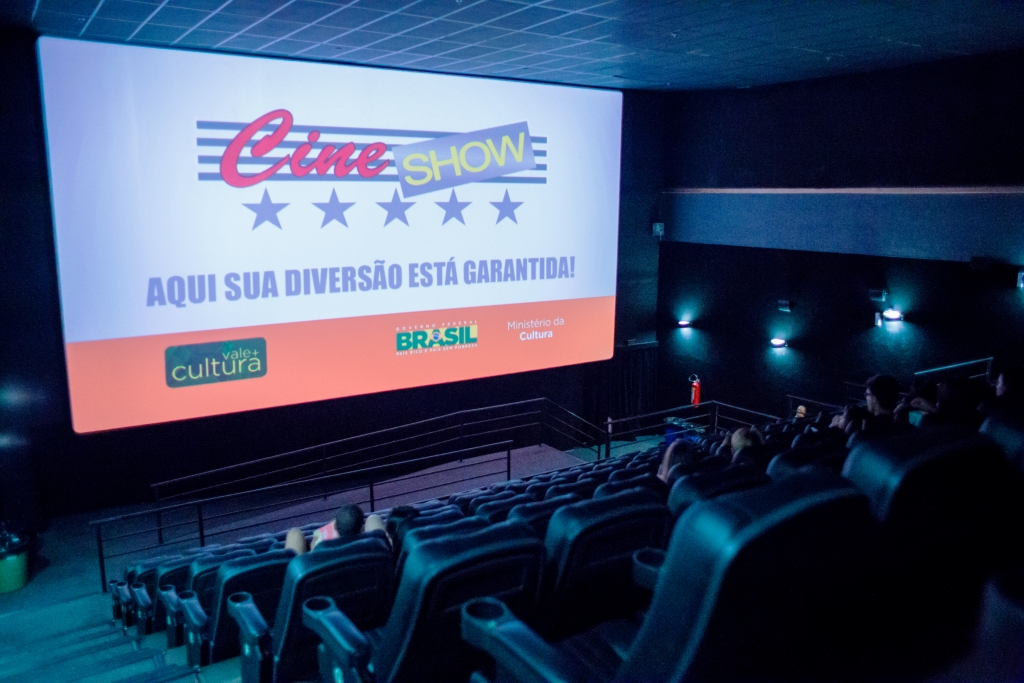 Interior da sala do complexo Rede Cine Show Shopping Teresópolis da cidade de Teresópolis, Rio de Janeiro